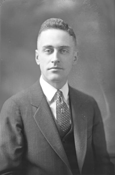 Representative F. B. Danskin